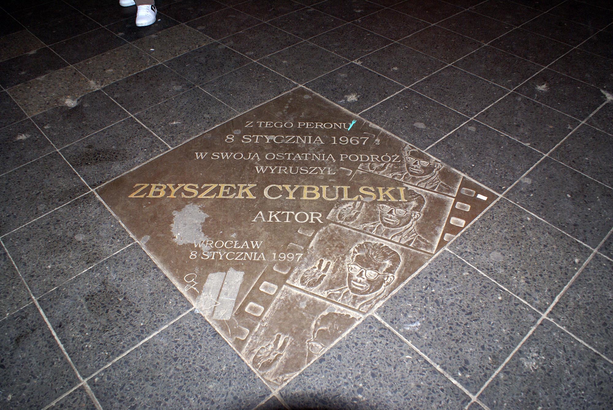 Wrocław, zespół Dworca Głównego